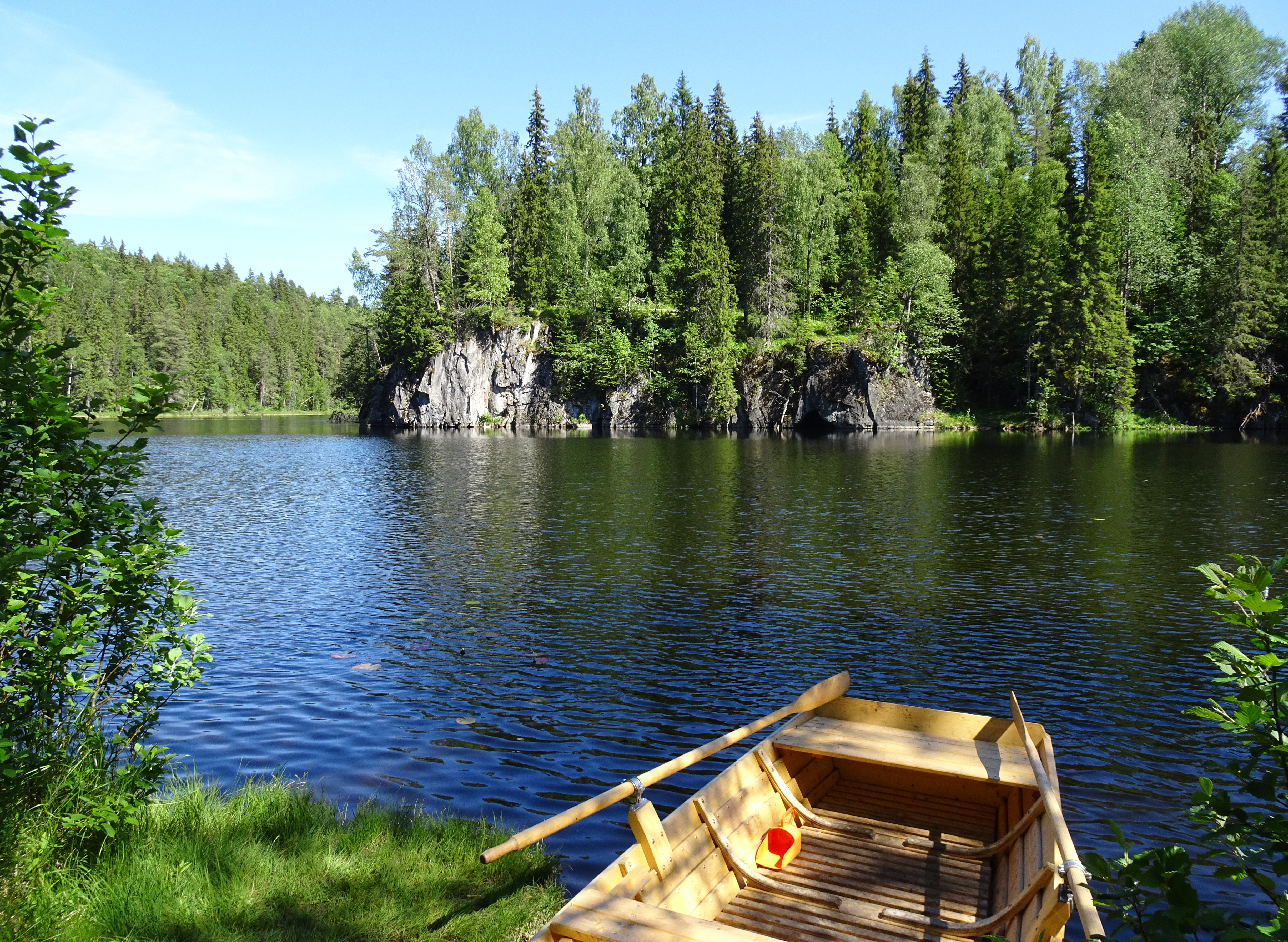 Sjön Jätturn i Jätturns naturreservat